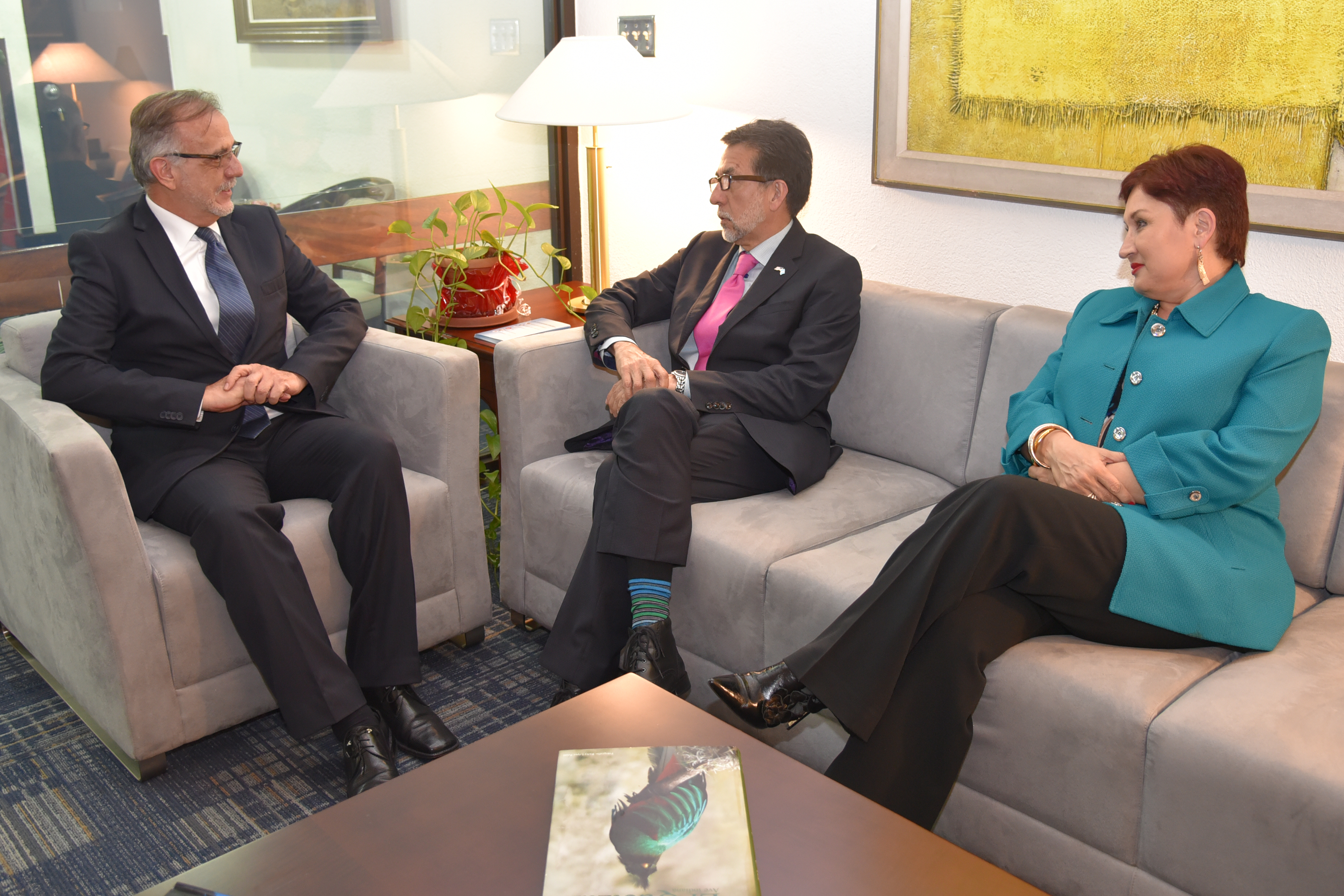 Llegada del Embajador Arreaga a Guatemala